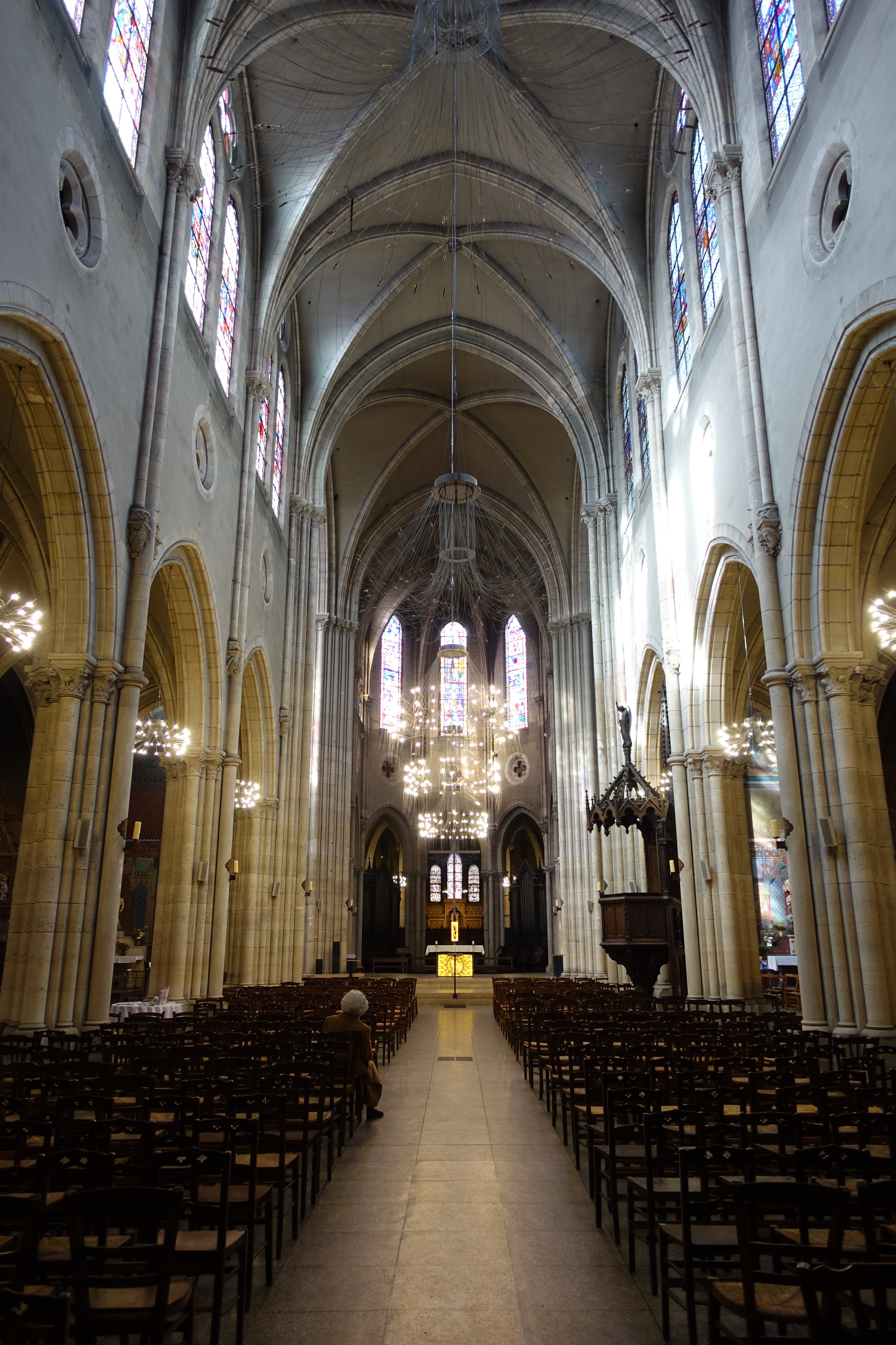 Eglise Saint-Jean-Baptiste de Belleville @ Paris 19 Saint-Jean-Baptiste-de-Belleville, 139 Rue de Belleville, 75019 Paris, France.